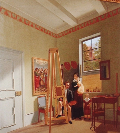 Gemälde: Maleratelier von Christian Tunica, mit Frau und Tochter Minna Tunica, Sohn Hermann Tunica. An der Wand ist das Gemälde ,,Die Heilige Cecilie" zu sehen. Diese beiden Gemälde wurden 2008 aus dem Nachlass der Familie Tunica in Braunschweig für ~24.000 Euro nach München im Wege einer Auktion verkauft.